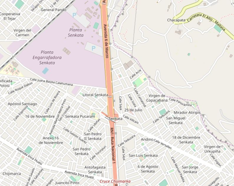 Zona de Senkata, al Sur de El Alto